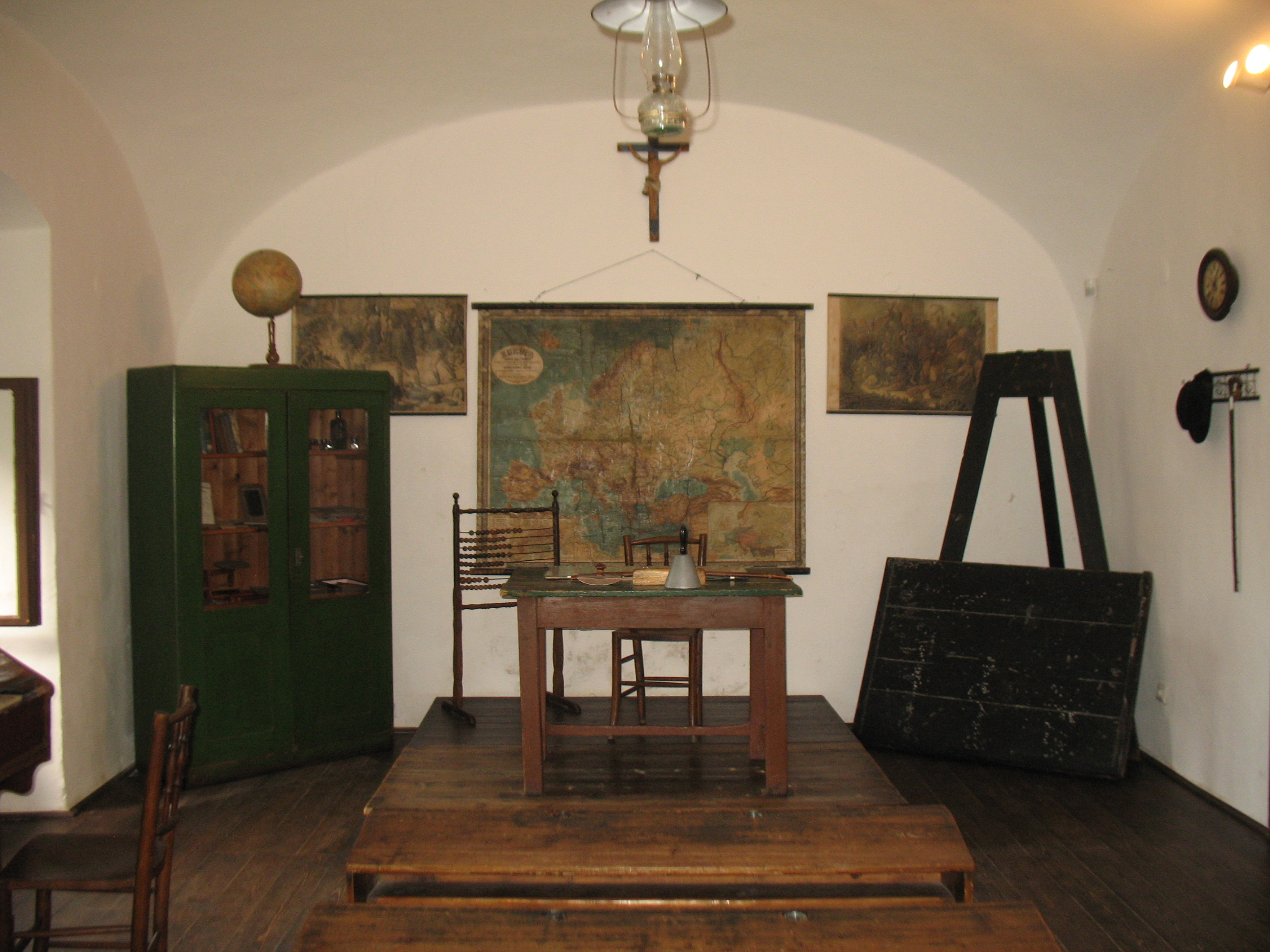 Tapolca